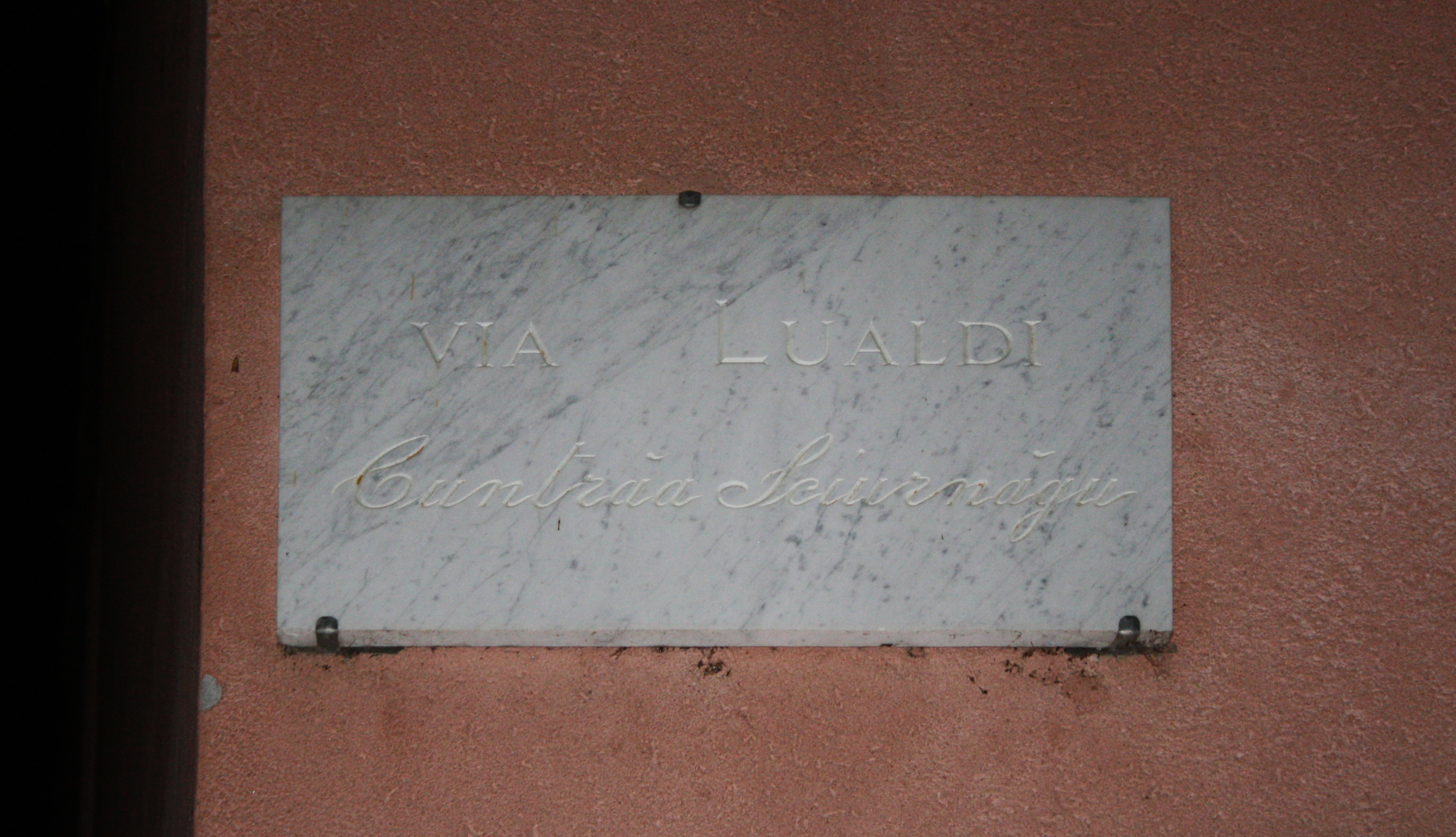 Targa indicante l'attuale nome della via Giuseppe Lualdi a Busto Arsizio e l'antico nome di Cuntràa Sciornágu (contrada Sciornago).